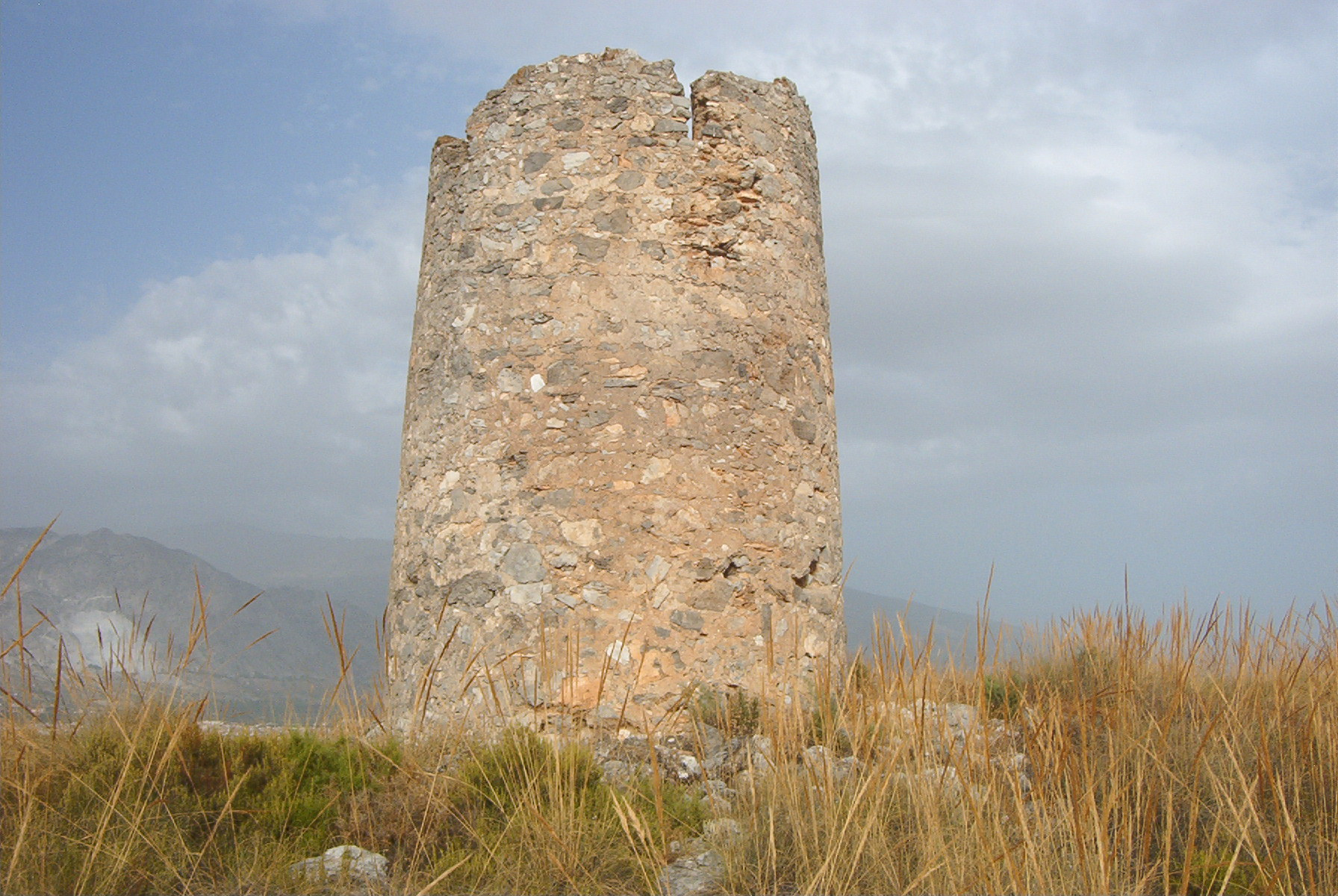 Atalaya árabe de Cónchar (Granada, España)